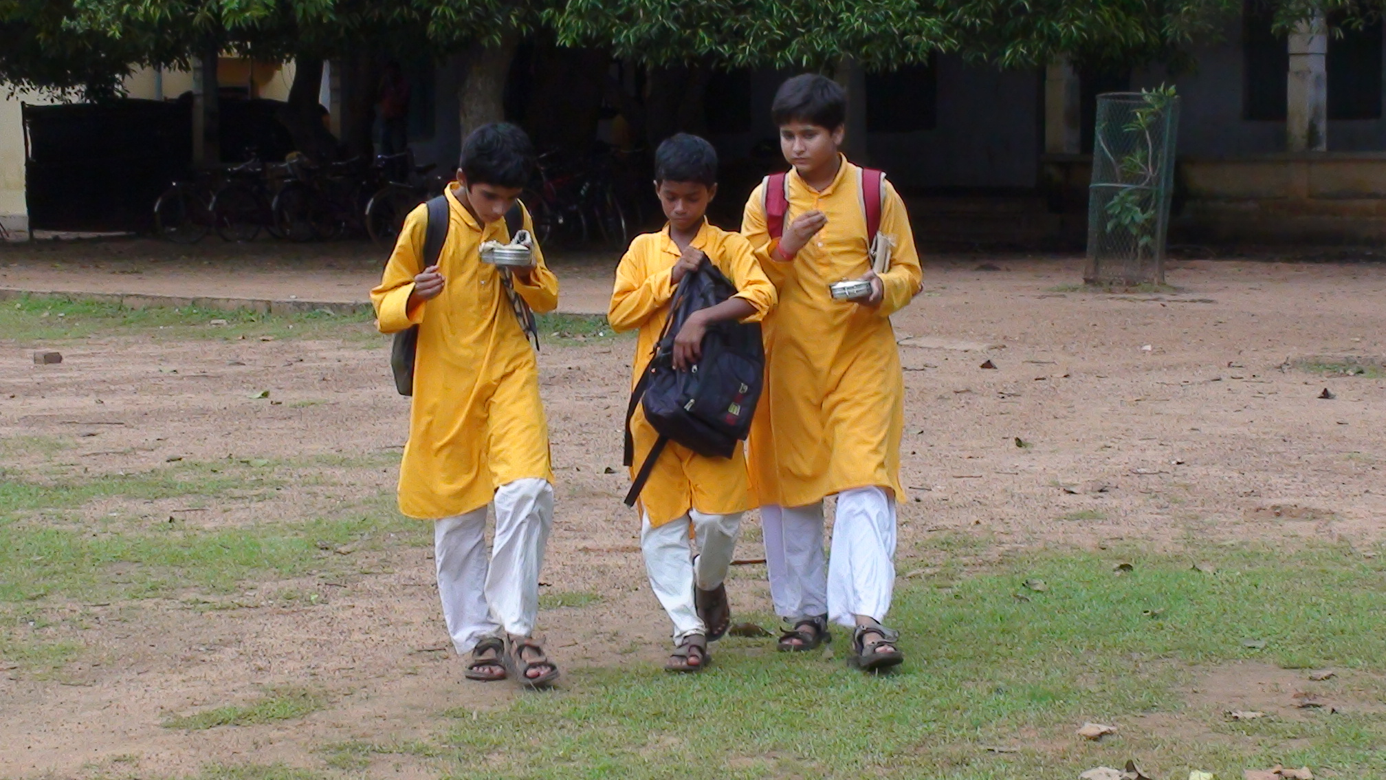 கல்கத்தாவில் தாகூர் பெயரால் விளங்கும் சாந்திநிகேதன் பள்ளியில் மாணவர்கள்.